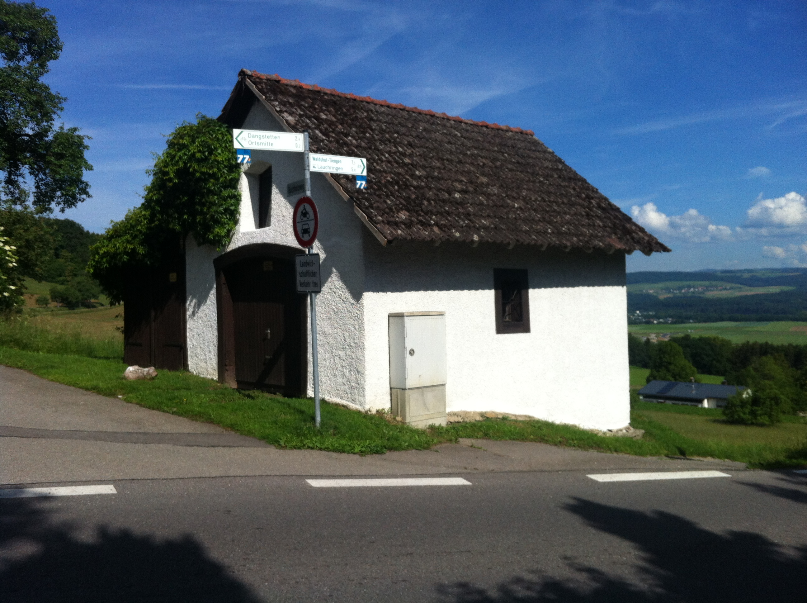 Küssaberg, Gemeinde im Landkreis Waldshut in Baden-Württemberg. Die ehemalige Kapelle des Klosters St. Blasien in Bechtersbohl, Passhöhe.